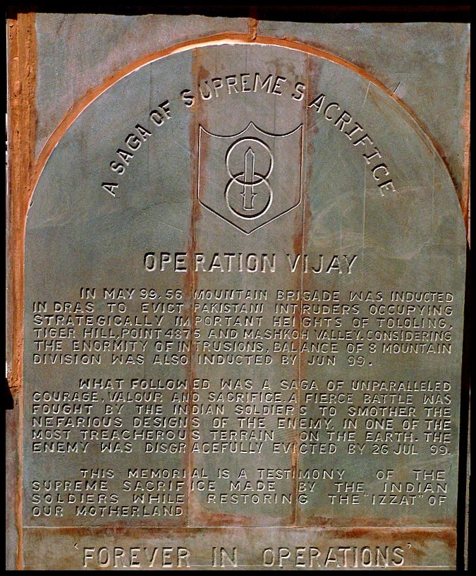 Kargil war memorial